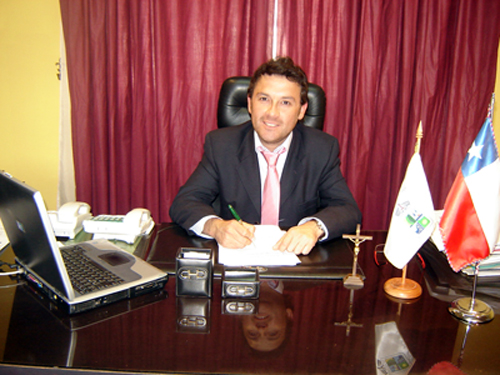 Marcelo Cabrera, alcalde suplente de Pichilemu